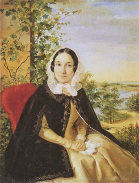 Ekaterina Lazareva (1812—1877)